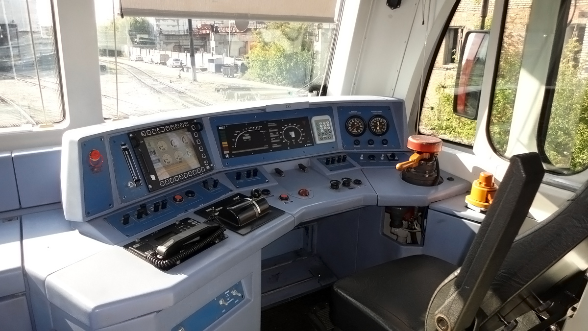 Интерьер кабины №1 тепловоза ТЭП70БС-275. Пульт управления